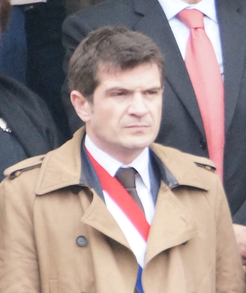 dans la tribune lors du défilé du 14 juillet.